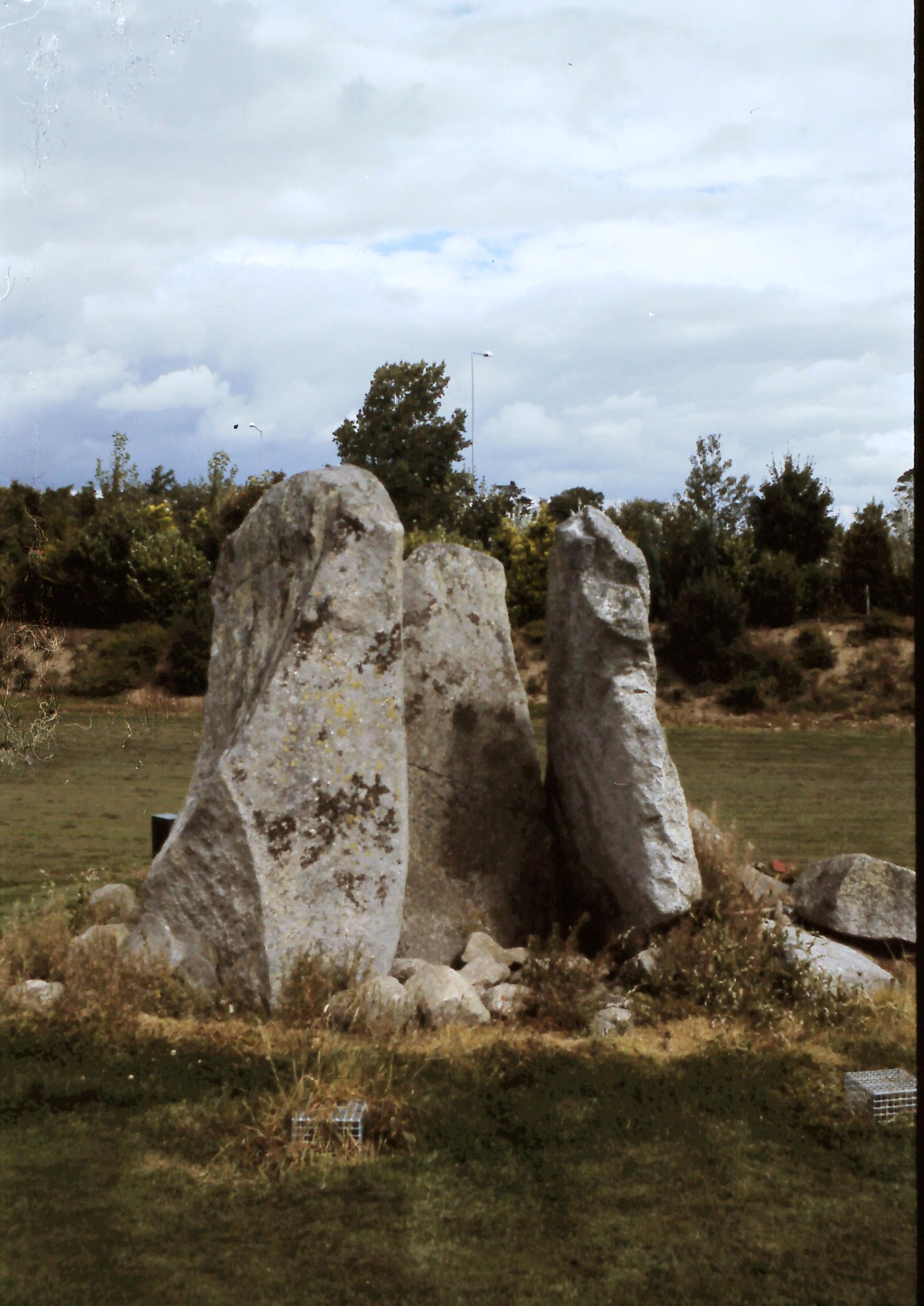 Brehon's Chair - Taylorsgrange